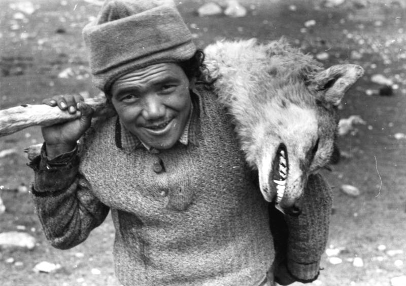 Gyaukang, tibetischer Wolf mit Pansi